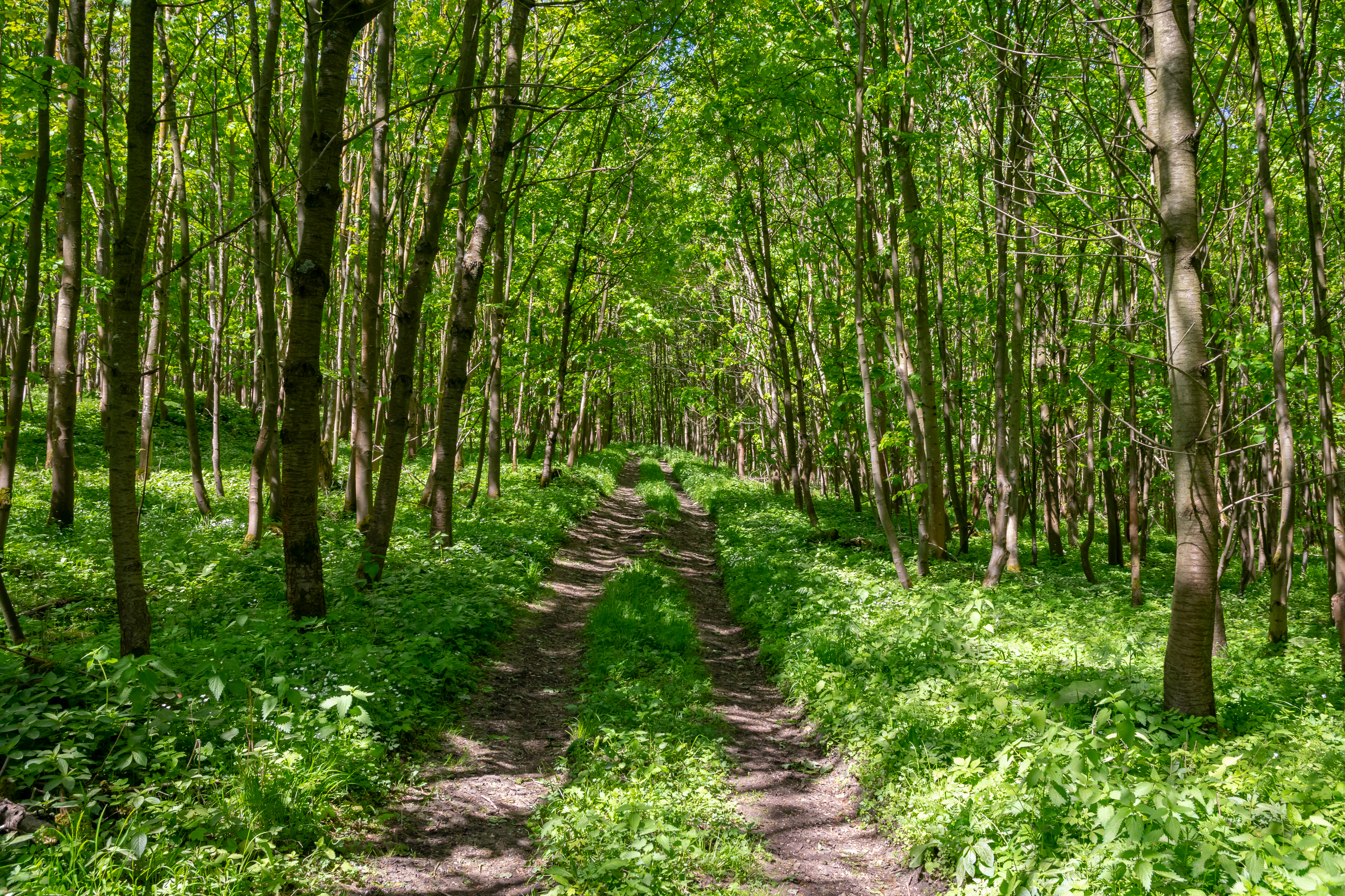 Naturschutzgebiet Asseler Wald, Warburg, Kreis Höxter; Gaulskopf